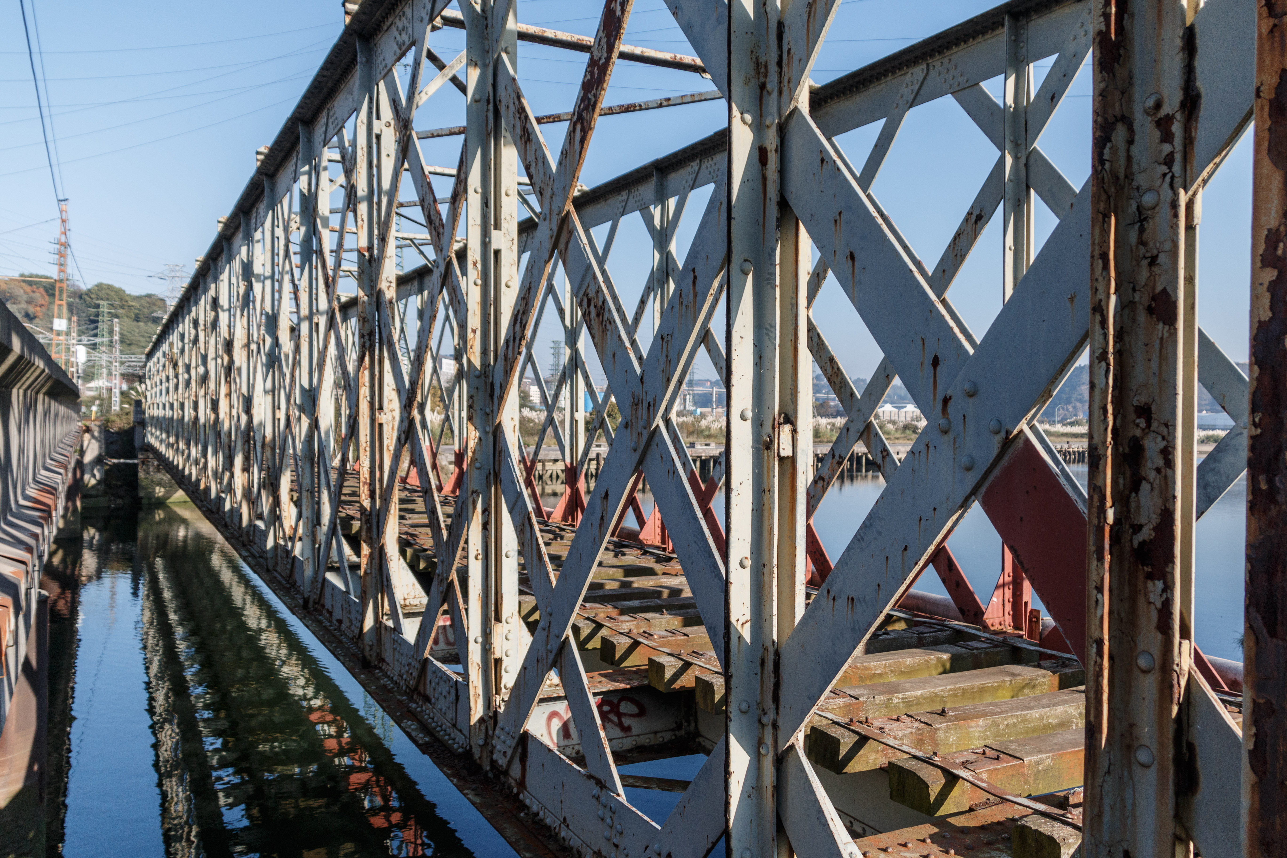 Cadagua ibaiaren gaineko Pablo Alzola jaunaren burdinazko zubia